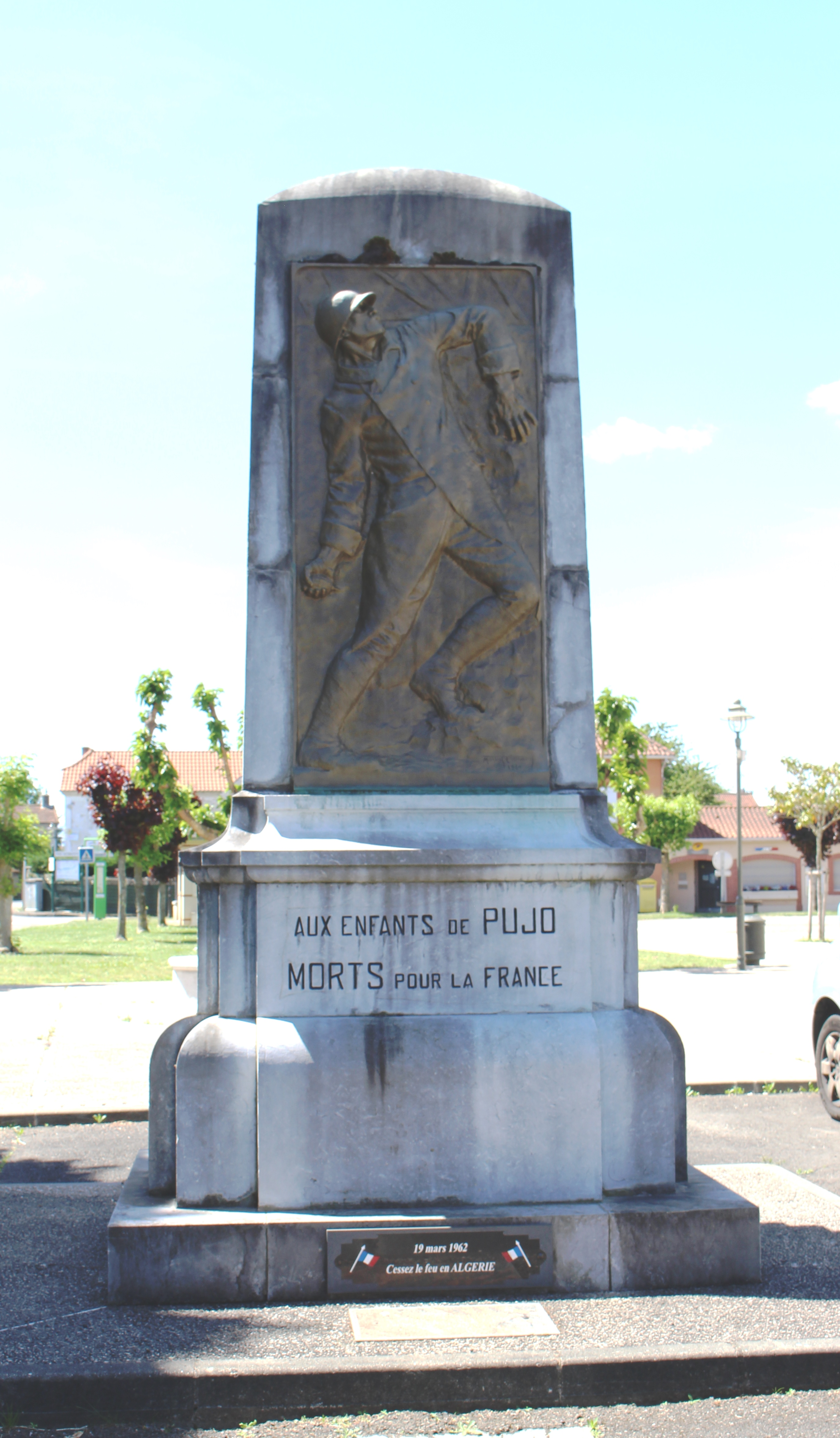 Monument aux morts de Pujo (Hautes-Pyrénées)